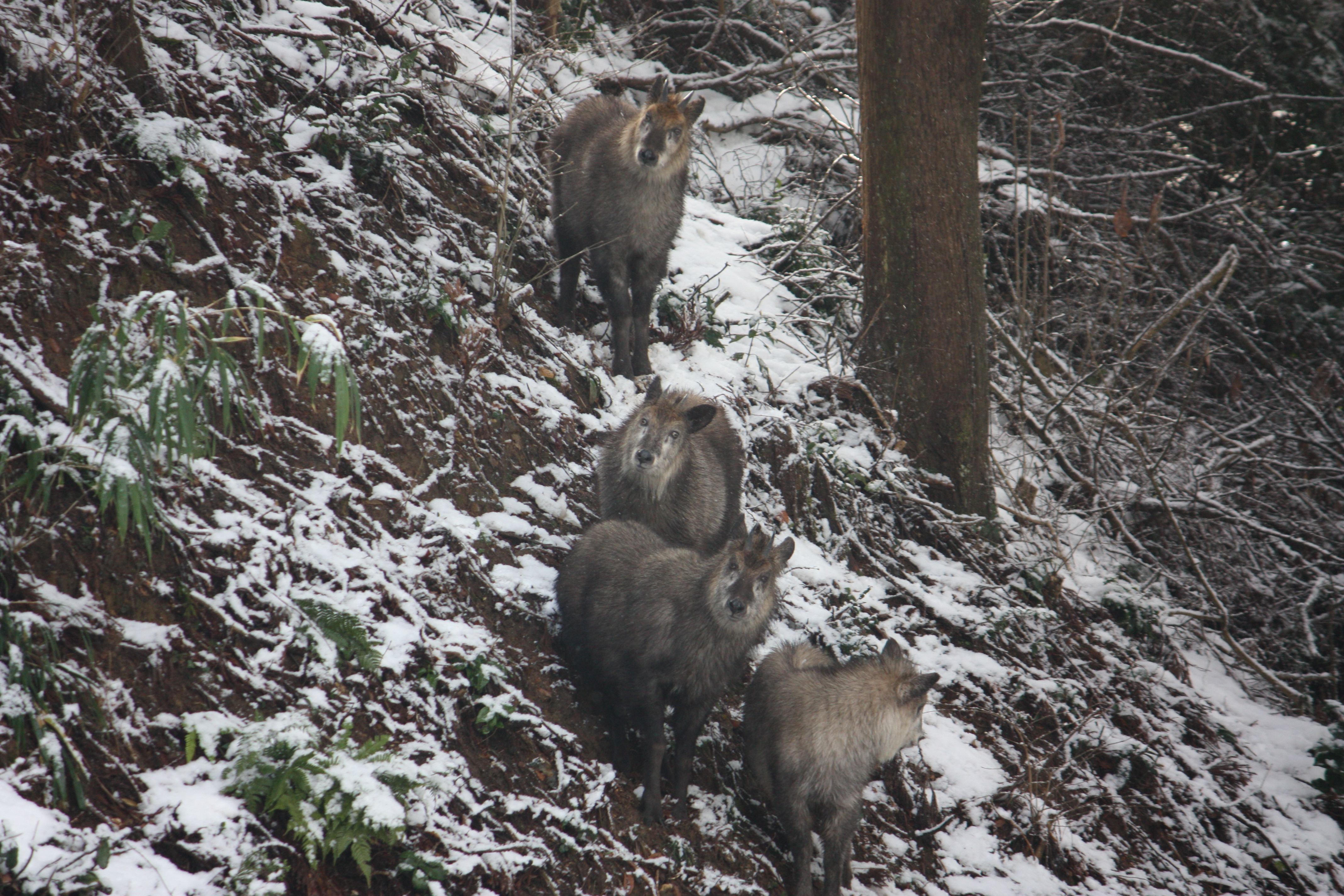 4頭のニホンカモシカの群れ